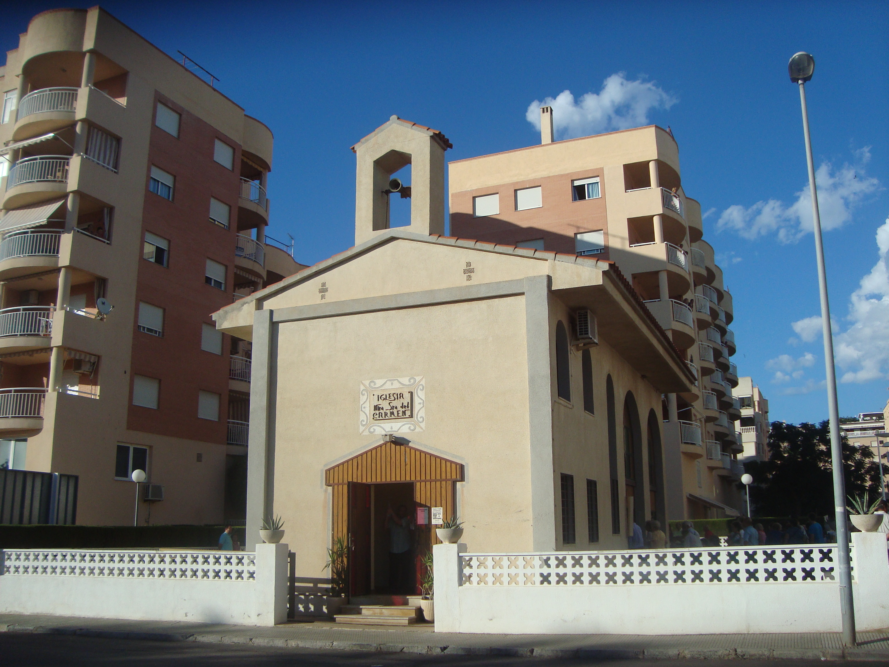 Esglesia de la Verge del Carmen (Torrenostra, Torreblanca)